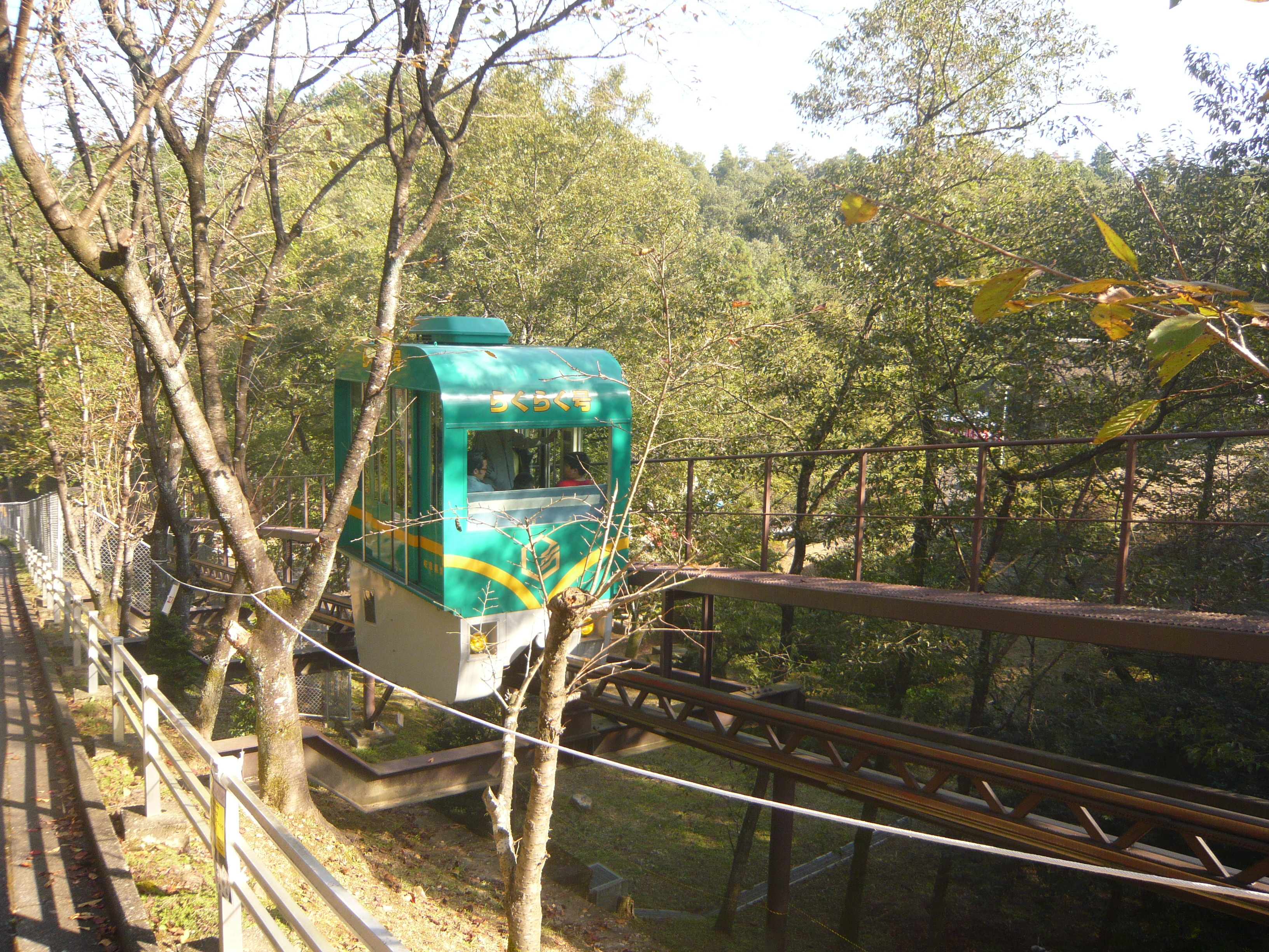 Gifu Prefectural Museum 岐阜県博物館 らくらく号（岐阜県博物館）,Seki,Gifu,Japan（岐阜県関市）で撮影。